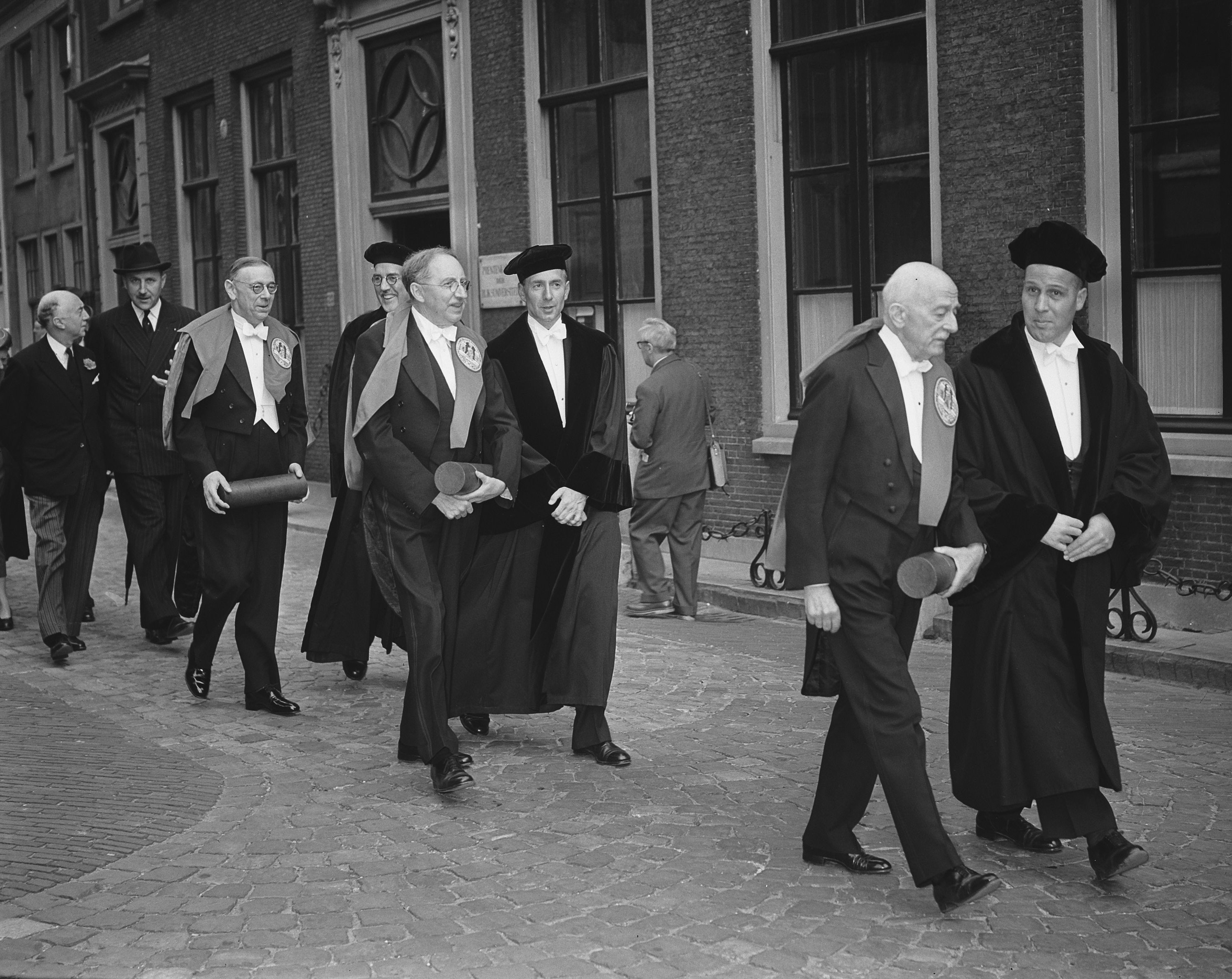 Collectie / Archief : Fotocollectie Anefo Reportage / Serie : [ onbekend ] Beschrijving : Erepromotie PEN Congressisten Leiden. Wandeling door de Kloksteeg. Links onbekende en Joseph Luns, daarnaast Victor van Vriesland en Pieter Minderaa, daarnaast E.M. Forster en Fred Bachrach en rechts Jean Schlumberger en Sem Dresden. Datum : 23 juni 1954 Locatie : Leiden, Zuid-Holland Trefwoorden : Erepromoties Fotograaf : Bilsen, Joop van / Anefo Auteursrechthebbende : Nationaal Archief Materiaalsoort : Glasnegatief Nummer archiefinventaris : bekijk toegang 2.24.01.09 Bestanddeelnummer : 906-5421